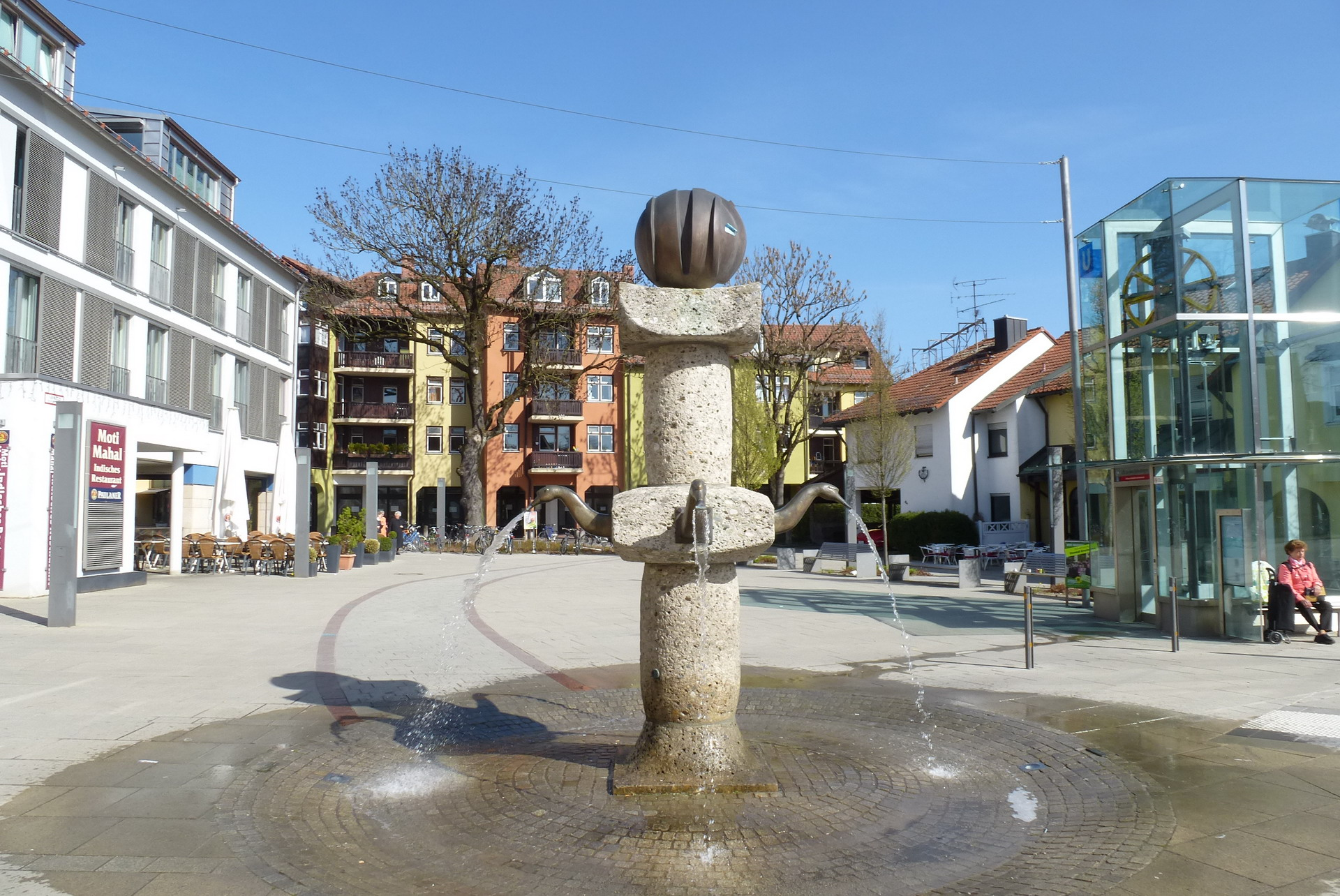 Garching, Schwanenbrunnen am Marktplatz